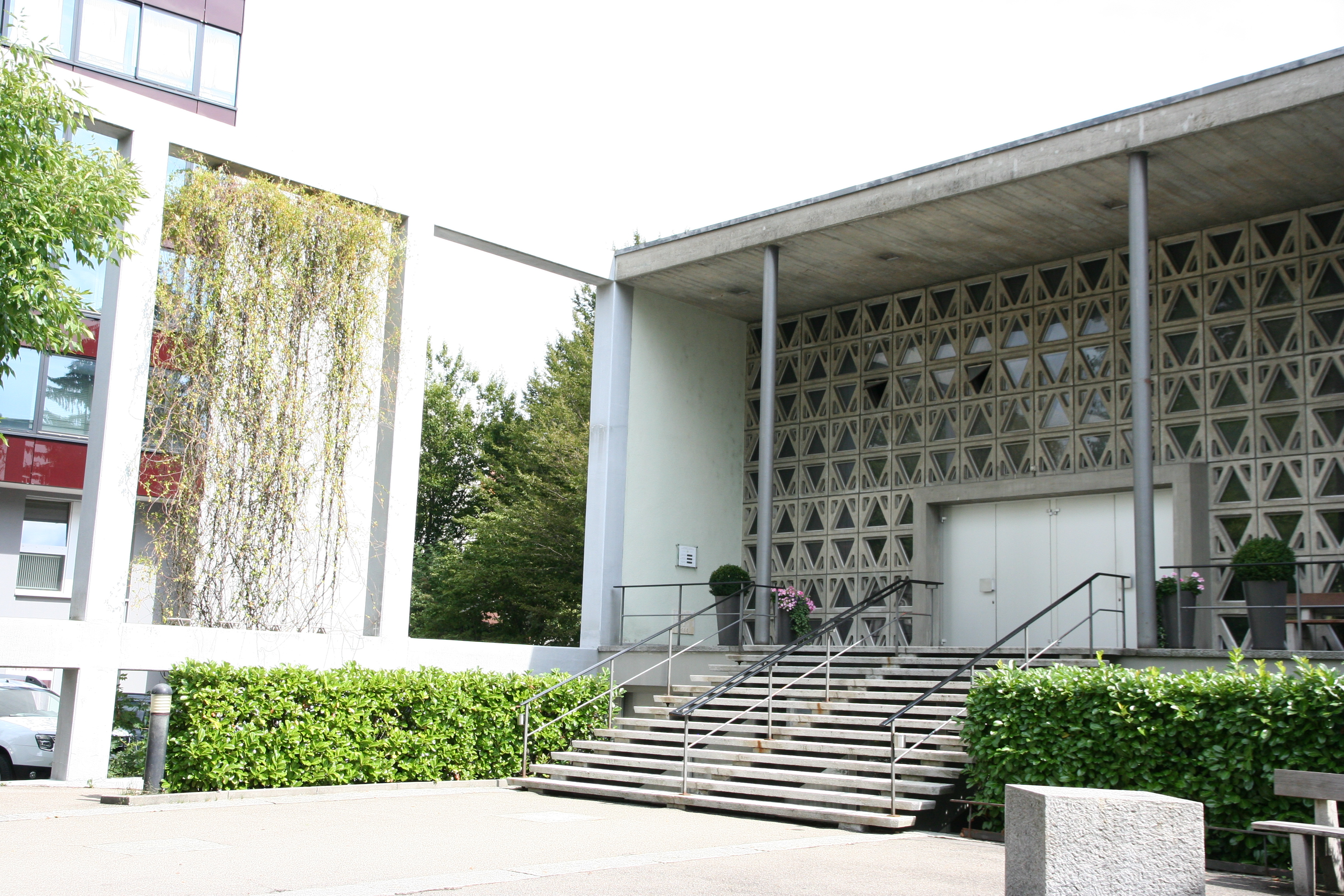 Römisch-katholische Pfarrkirche Bruder Klaus Biel